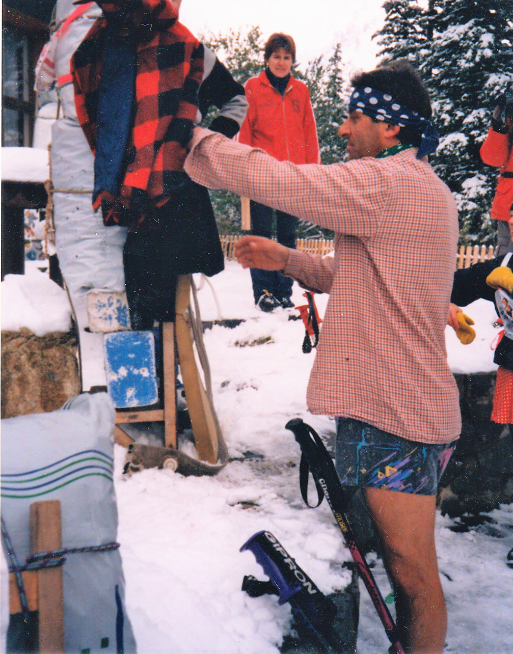 Súťaž horských nosičov Sherpa rallye z Hrebienka na Zbojnícku chatu v roku 1999, balenie nákladu